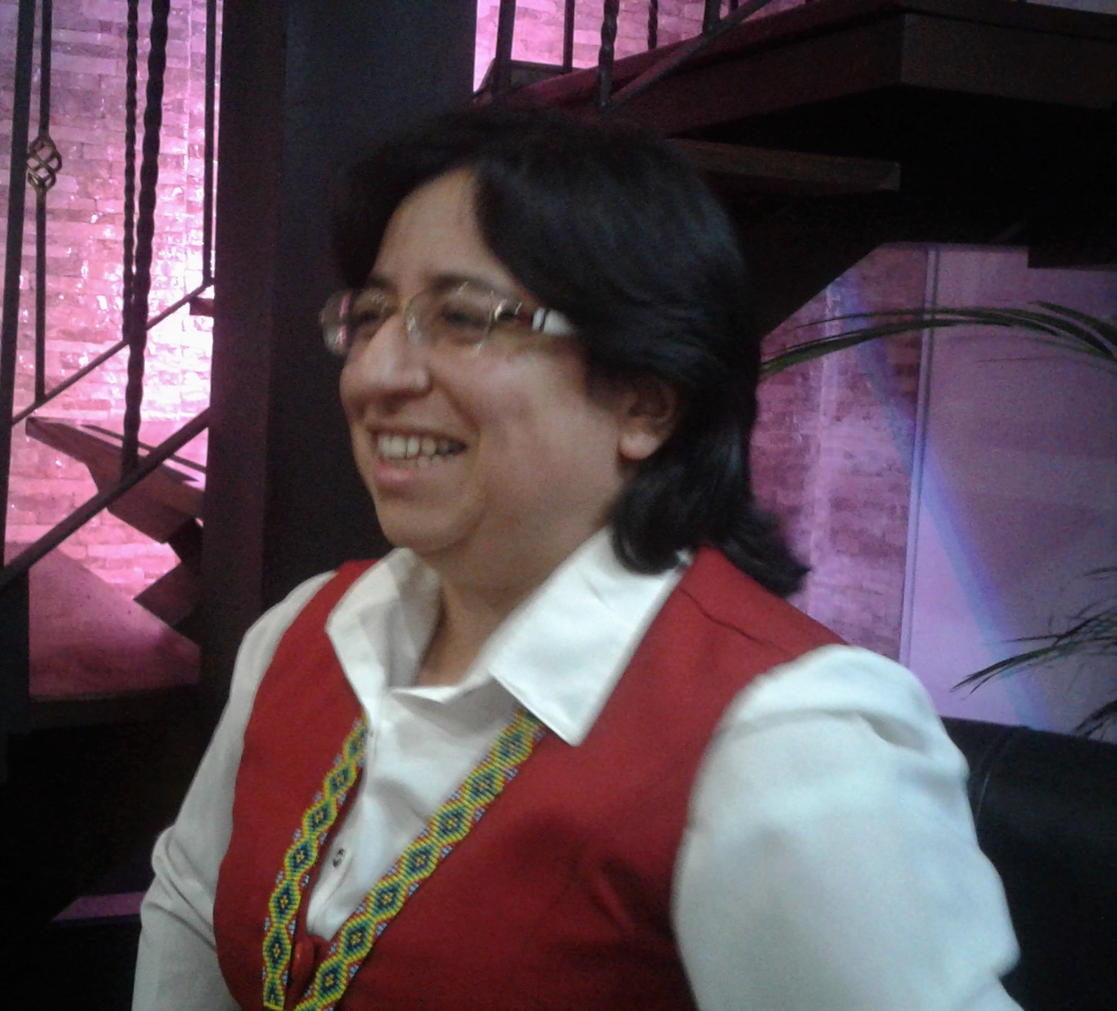 Judith Maldonado Mojica, activista social y vocera del movimiento Voces de Paz